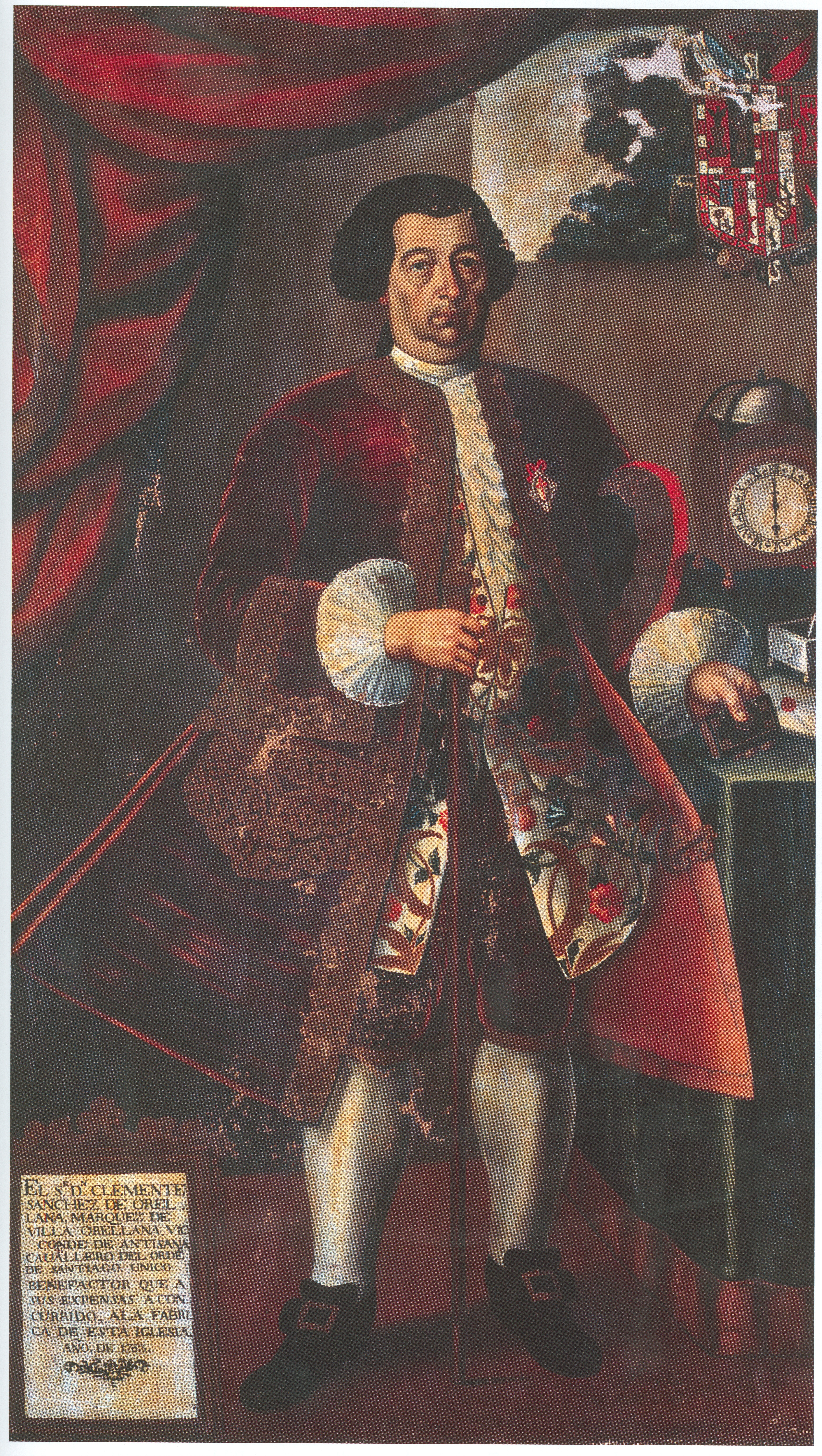 Moreno Egas, Jorge y Morán Proaño, Nancy. Historia del Antiguo Hospital San Juan de Dios de Quito Tomo I: Epoca Colonial (1565-1830). Quito Ecuador: Fundación Museos de la Ciudad, Septiembre, 2012. Consultado y compartido por el usuario J. Javier García A.